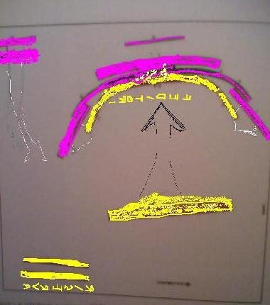 libera commons art di carlomarinobuttazzo attacco dei ghibellini nella battagglia di campaldino pubblico dominio ). Template Creative Commons BY-SA